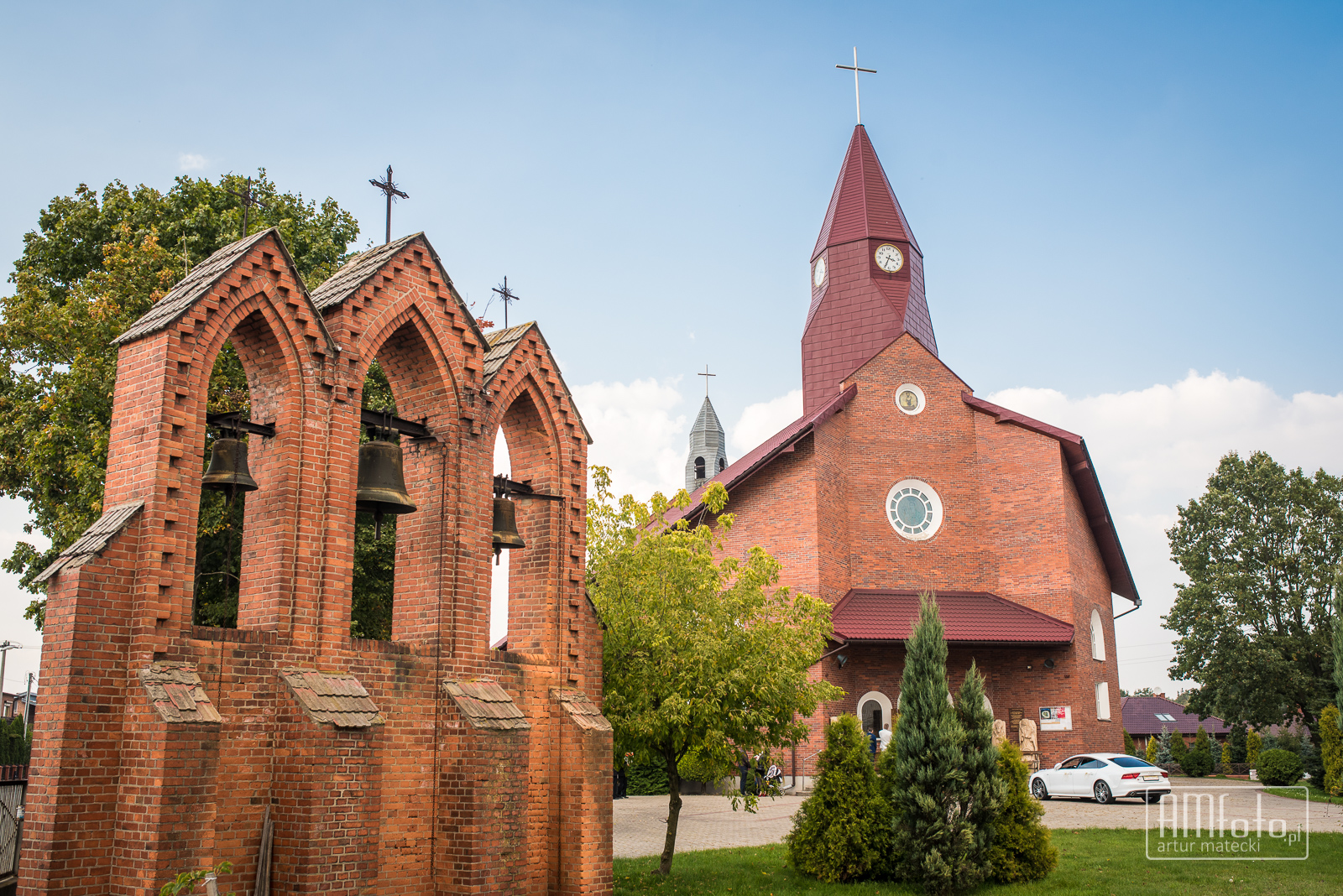 widok z dzwonnicą